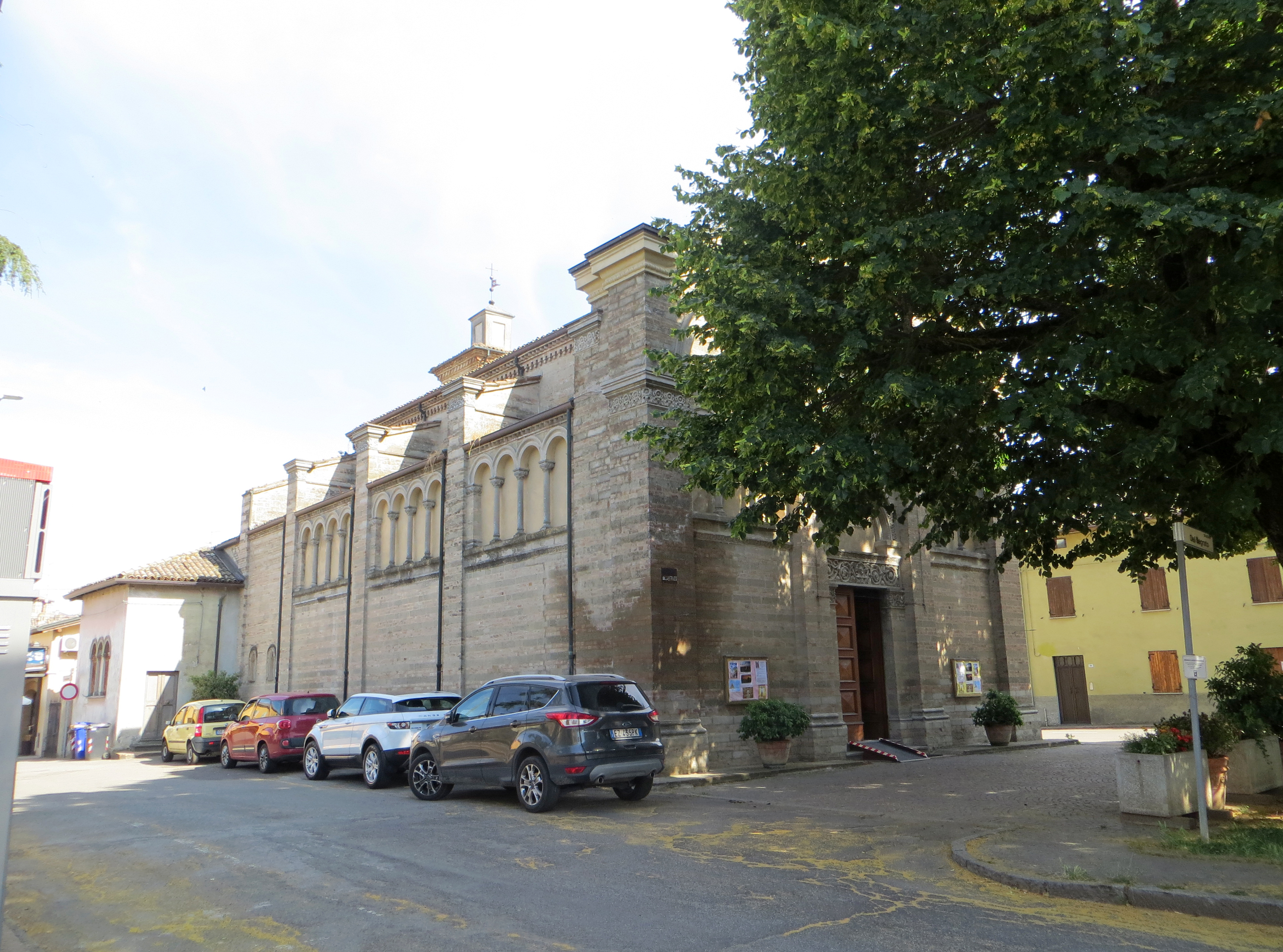 Chiesa di San Quintino (Montechiarugolo) - facciata e lato nord